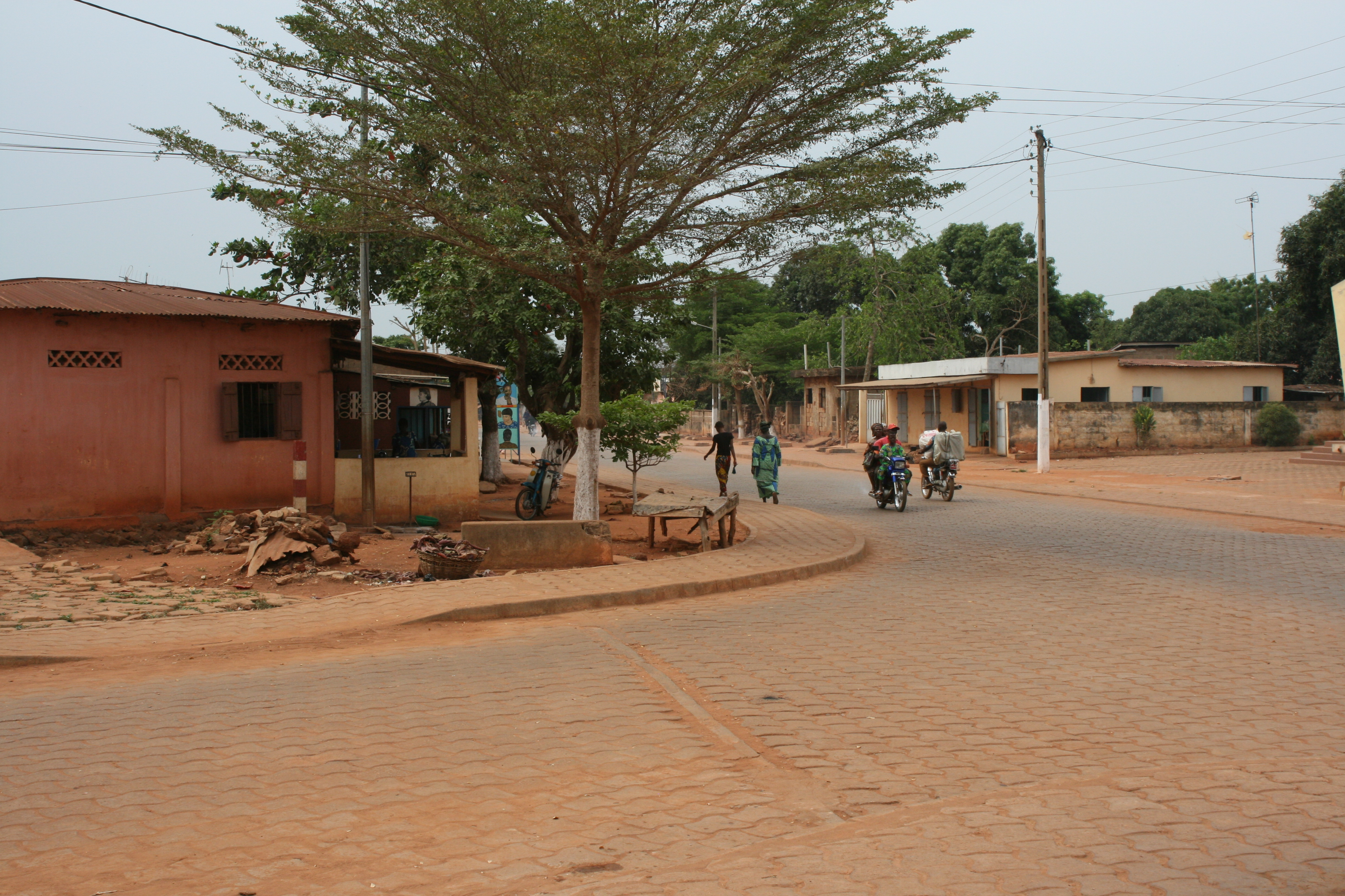 Abomey